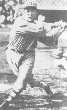 a baseball player from Japan, 景浦將（Masaru Kageura）